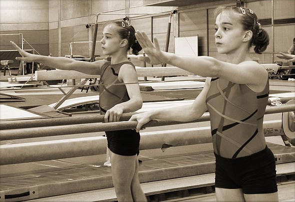 Elena Gómez en el CAR de Madrid el 20 de octubre de 2003.